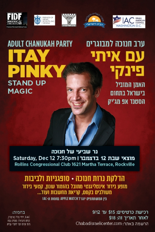 בית חבד וושינגטון.jpg.